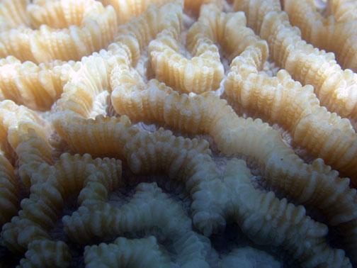 Platygyra daedalea, detalle de pólipos expandidos. Samoa Americana.